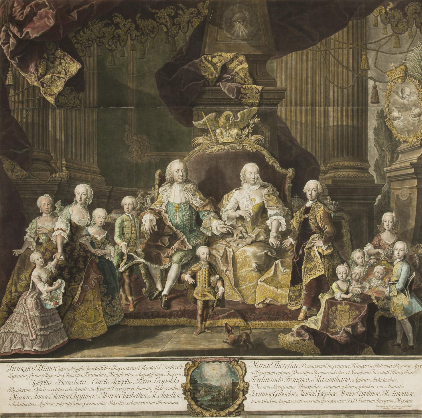 Portrait der Maria Theresia und des Franz von Lothringen mit Familie, im Druckstock rechts unten gekennzeichnet und datiert: Joann Gottfr Haid Sculpt Vienn 1760, kolorierte Mezzotinta/Papier, 116,5 x 118 cm